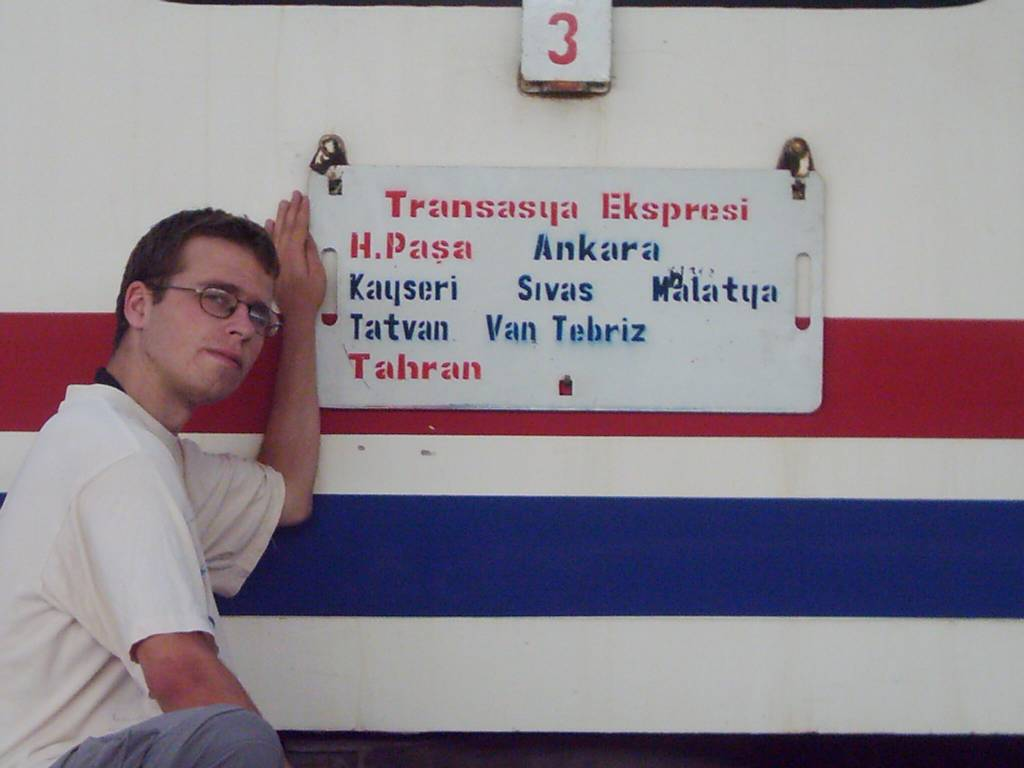 Train Istanbul - Teheran